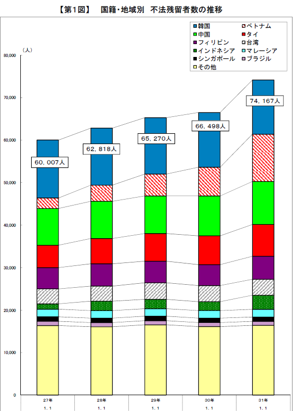 2014年～2019年（各年1月1日現在）の国籍・地域別の不法残留者数の推移